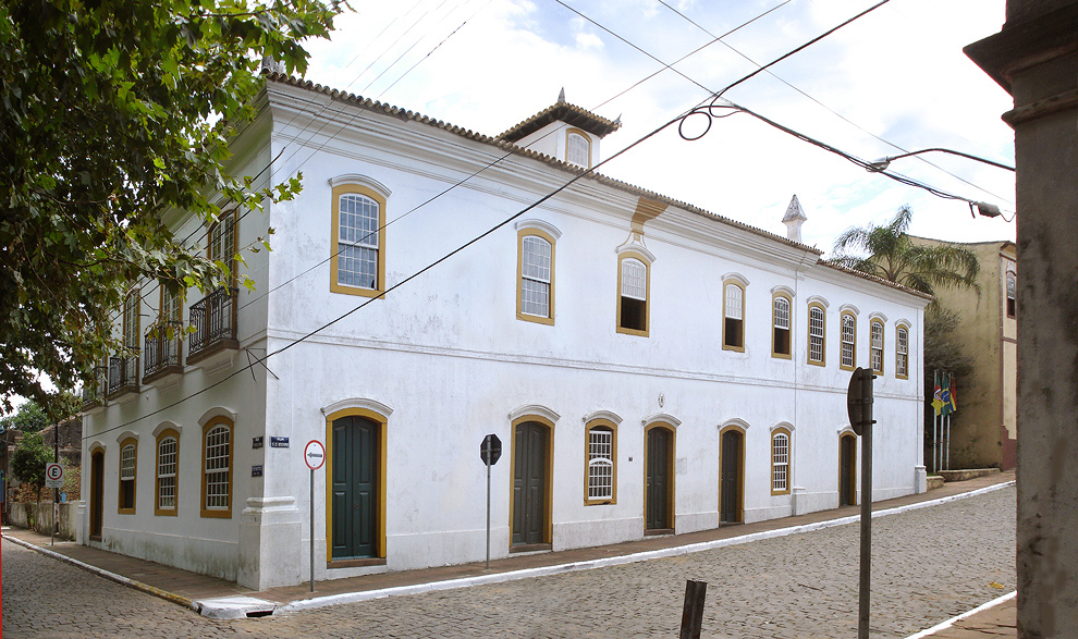 Antiga Casa de Sabino Antônio da Cunha Pacheco (1821), hoje a Prefeitura Municipal de Triunfo, Rio Grande do Sul, Brasil.